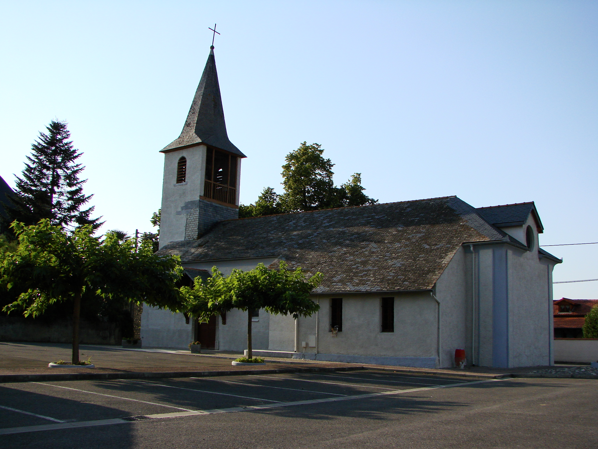 Vue du village de Chis dans les Hautes-Pyrénées (France) : Église et place du village au centre de Chis